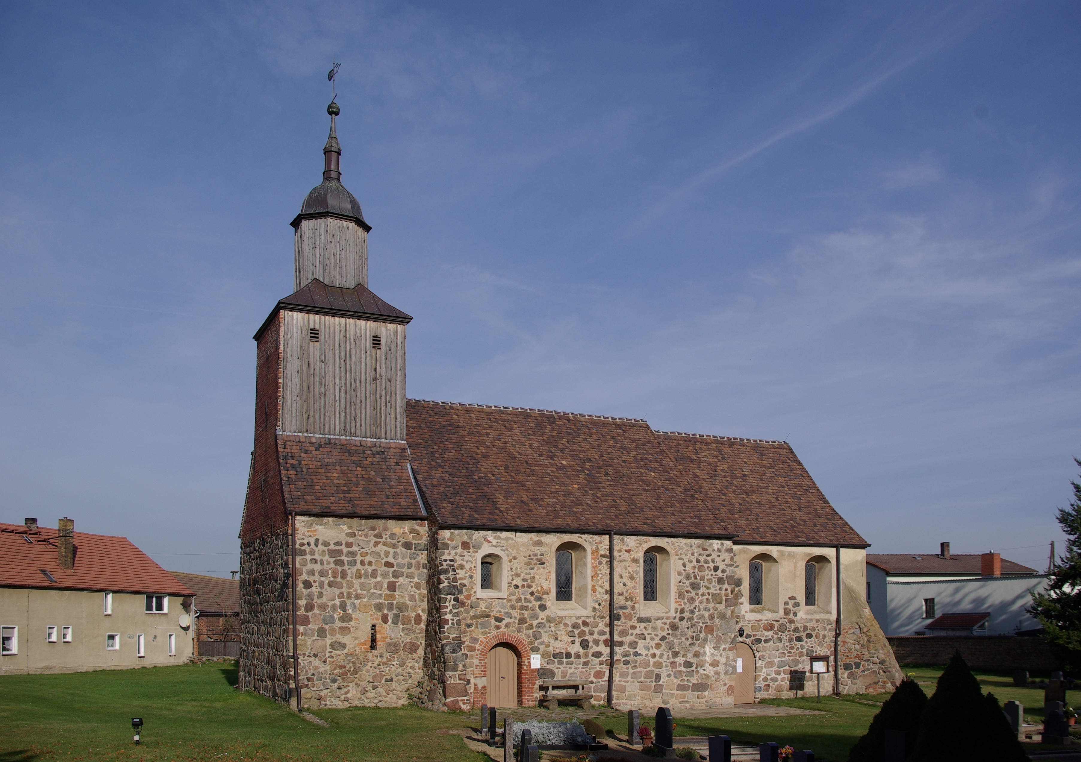 Niedergörsdorf Ortsteil Lindow in Brandenburg. Die Kirche steht unter Denkmalschutz.